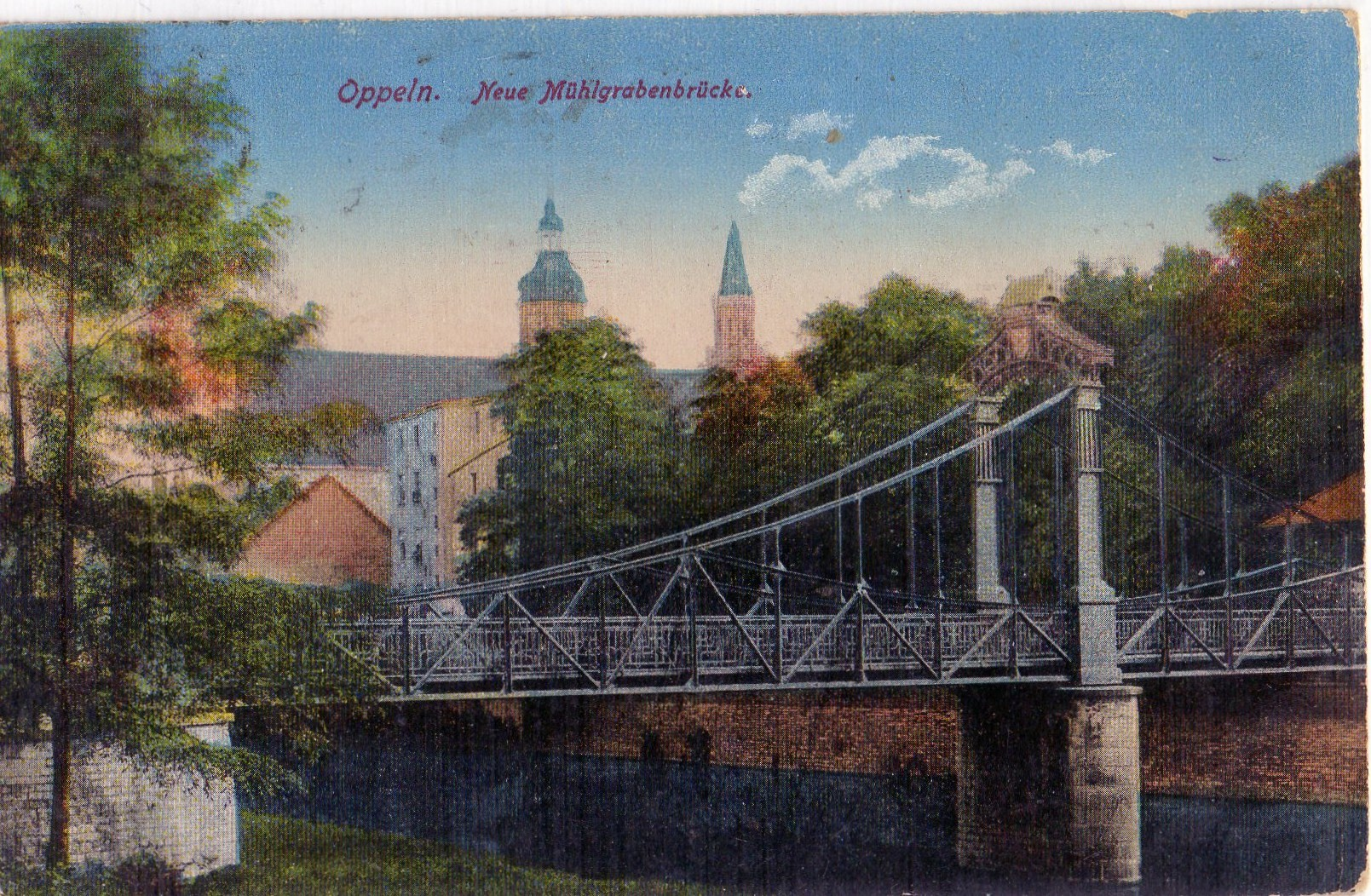 Alte Ansichtskarte von Oppeln/Opole - Pfennigbrücke 1917